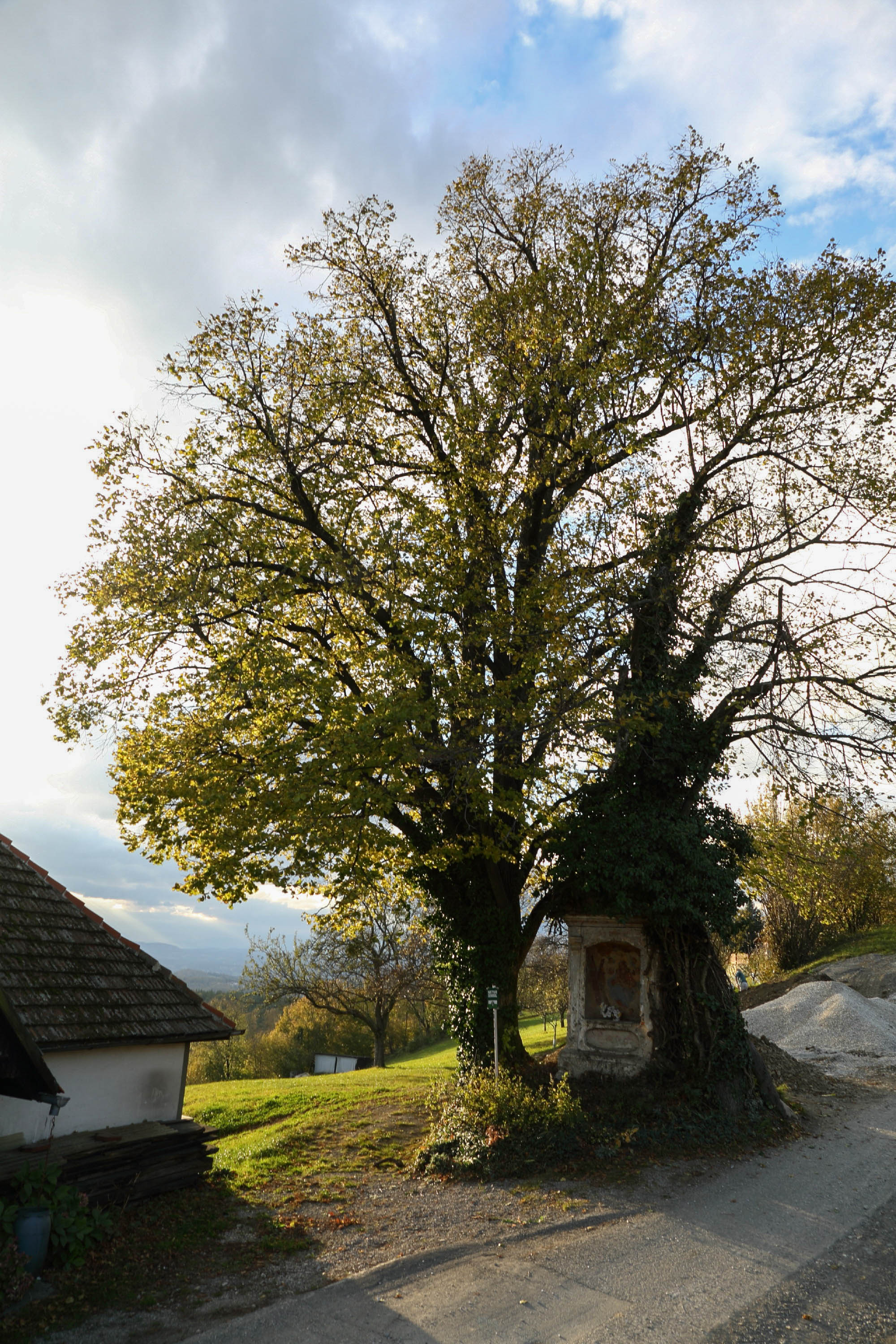 Sommerlinde (Tilia platyphyllos) This media shows the natural monument in Styria with the ID 1350. This media shows the natural monument in Styria with the ID 1351.